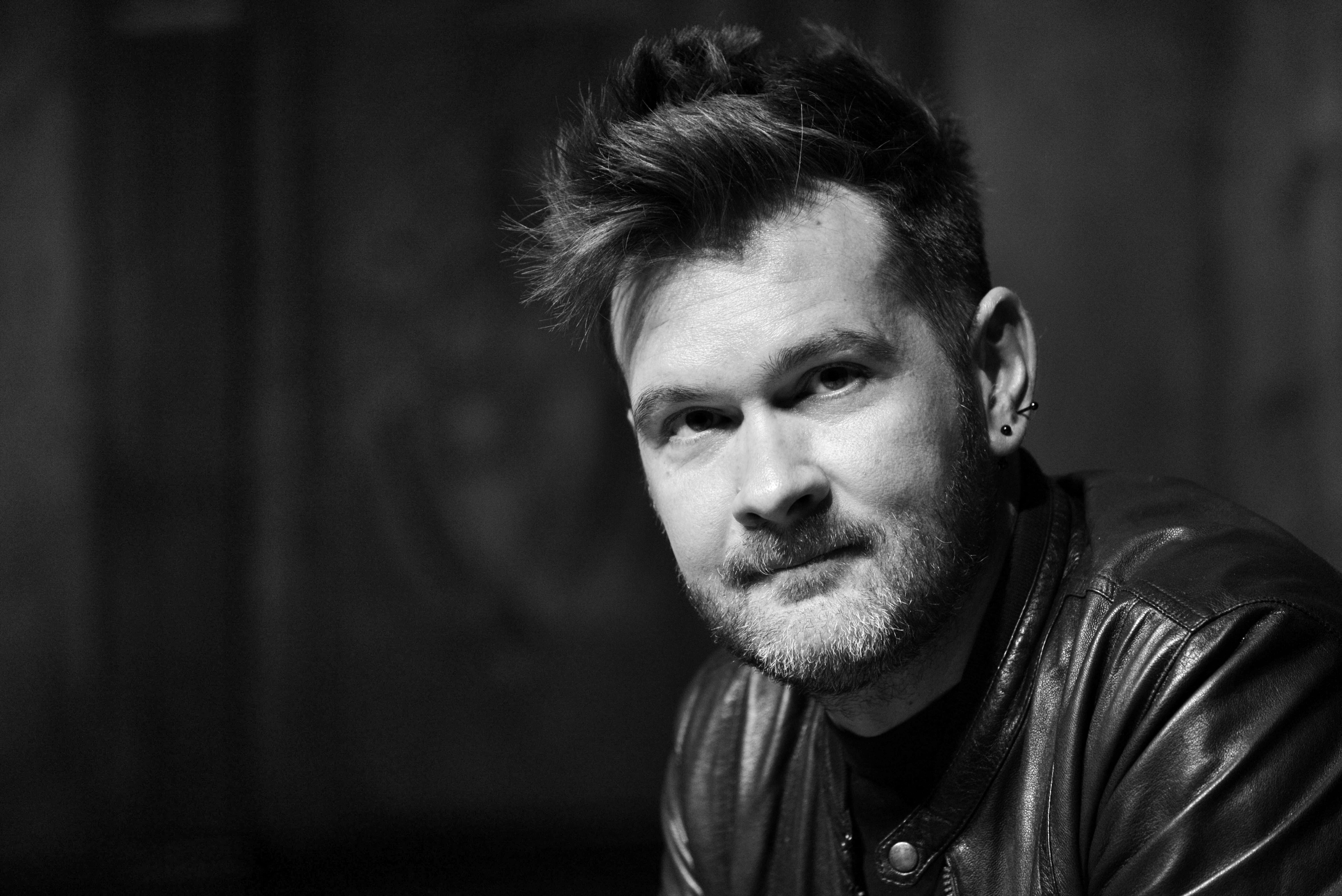 Andrea Mariano, tastierista del gruppo pop rock italiano negramaro, nel 2015